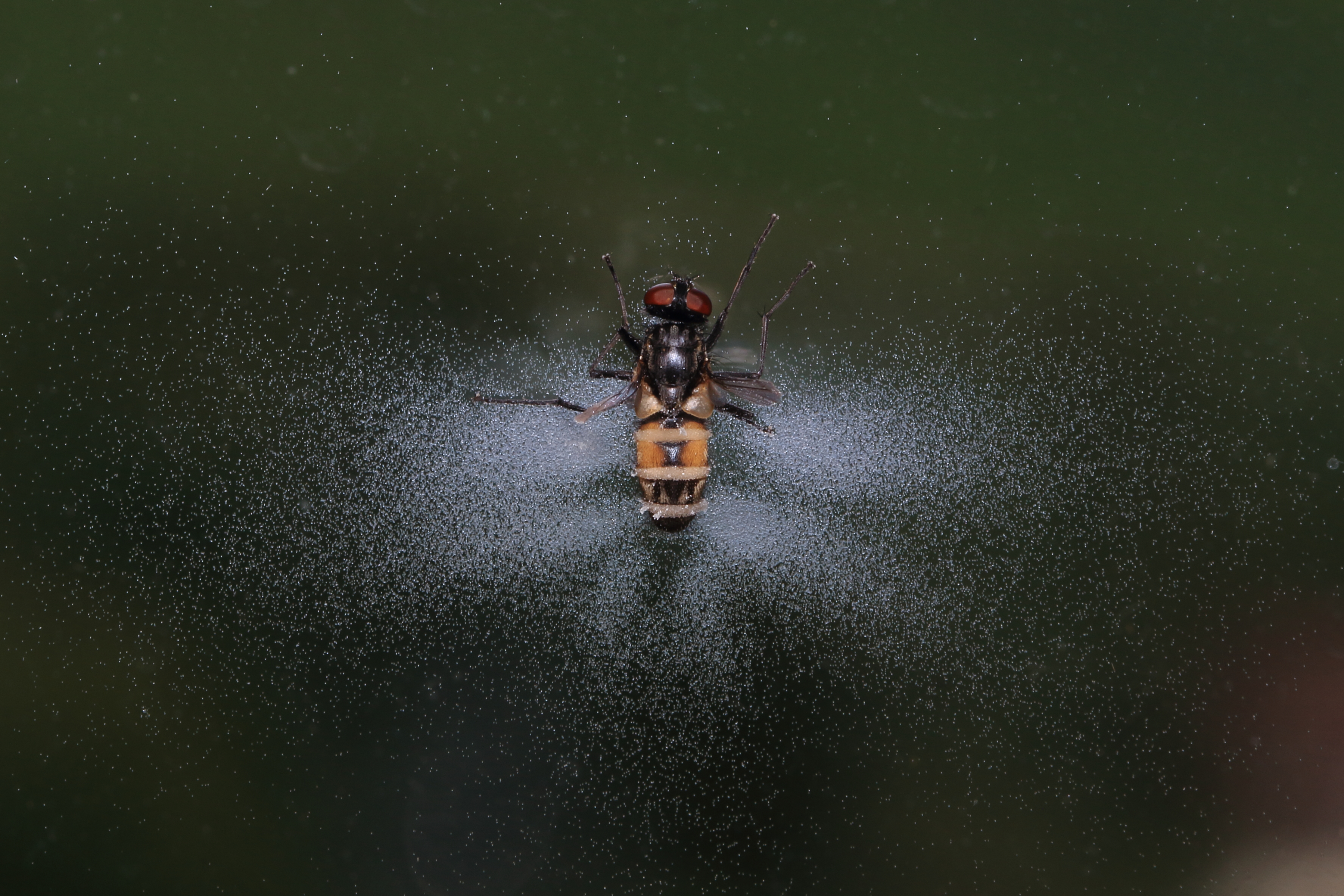 Stubenfliege Musca domestica am Fenster, getötet vom Fliegentöter, höchstwahrscheinlich Entomophthora muscae und umgeben von dessen Pilzsporen Die abgebildete Fliege und der Pilz wurden am 26./28. August 2017 von Tony Irwin und Stephane Lebrun auf bestimmt, auf Grund meiner (Norbert) Anfrage dort vom 25. August 2017 The fly and the fungus shown here has been identified by Tony Irwin and Stephane Lebrun on 2017, August 26th/28th, my (Norbert) question there dated 2017, August 25th